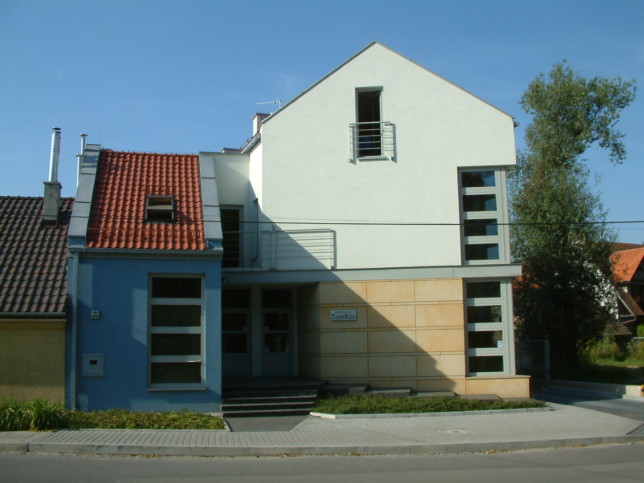 Ulica Tetmajera - siedziba wydawnictwa ZamKor